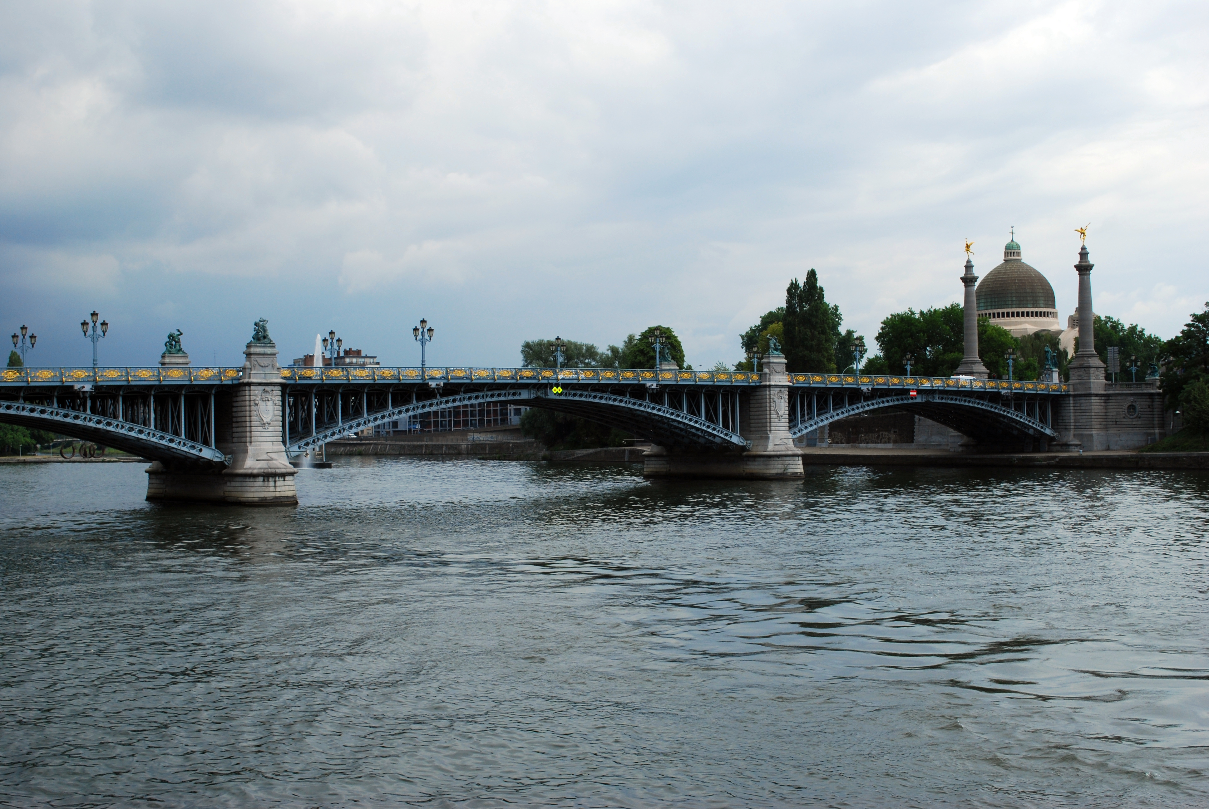 Le pont de Fragnée sur la Meuse à Liège.